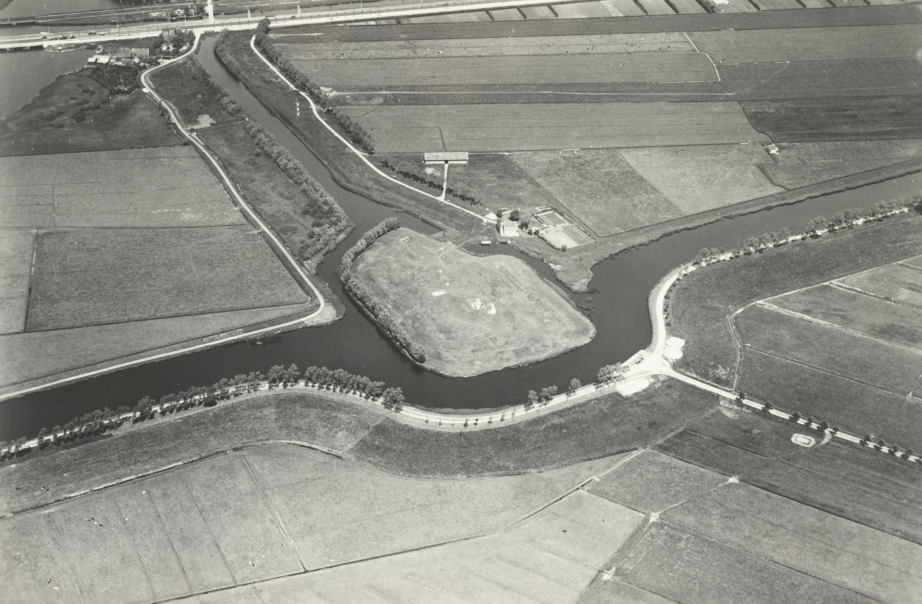 Luchtfoto van Fort De Liede.